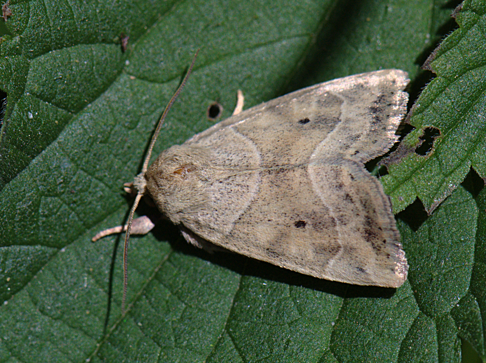 Trapezeule (Cosmia trapezina). Kleeste, Kreis Prignitz, Brandenburg